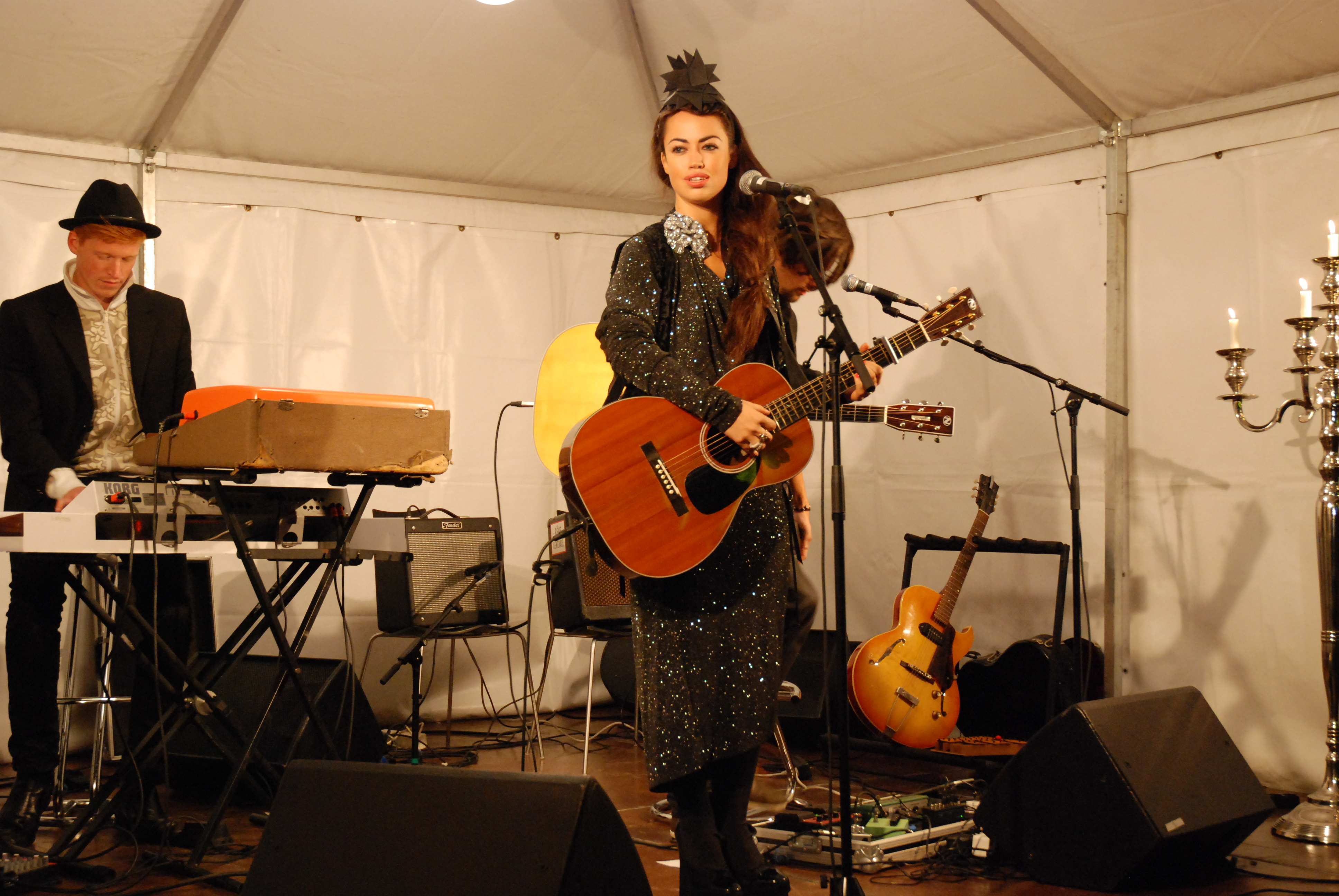 Aura med band